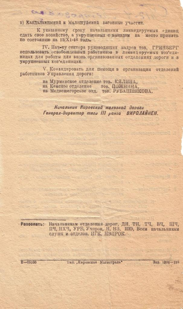 Приказ №705 от 12 ноября 1946 г. Начальника Кировской железной дороги генерал-директора тяги 3 ранга Вольдемара Матвеевича Виролайнена "Об организации отделений железных дорог и укрупнении отделений движения, отделений паровозного хозяйства и вагонных участков по Кировской железной дороге".